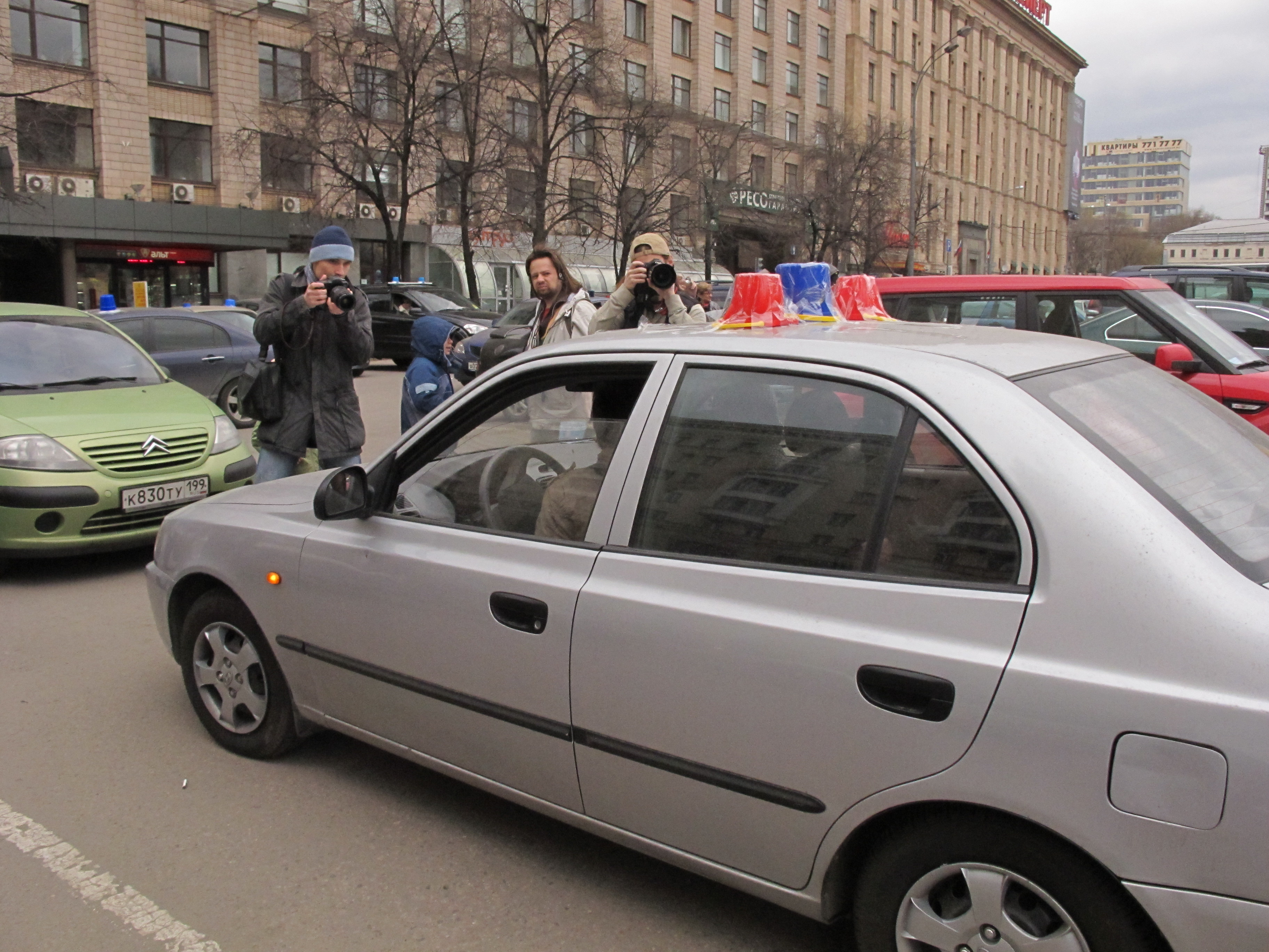 Общество Синих Ведёрок